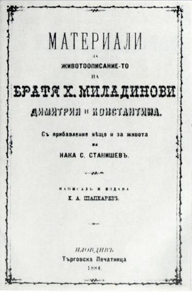 Материали за животоописанието на Братя Миладинови